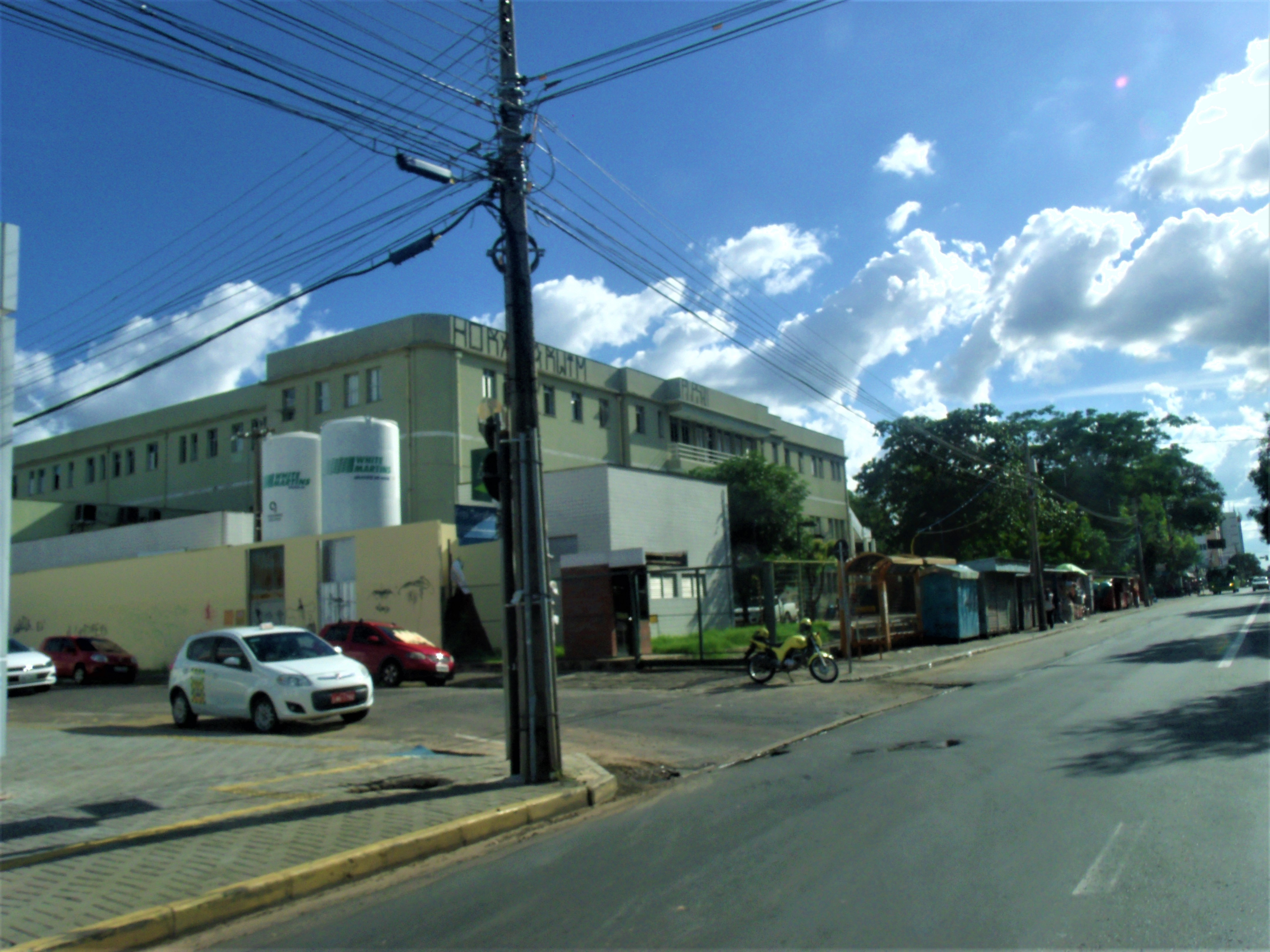 Prédio do Hospital Getúlio Vargas de Teresina (Piauí).